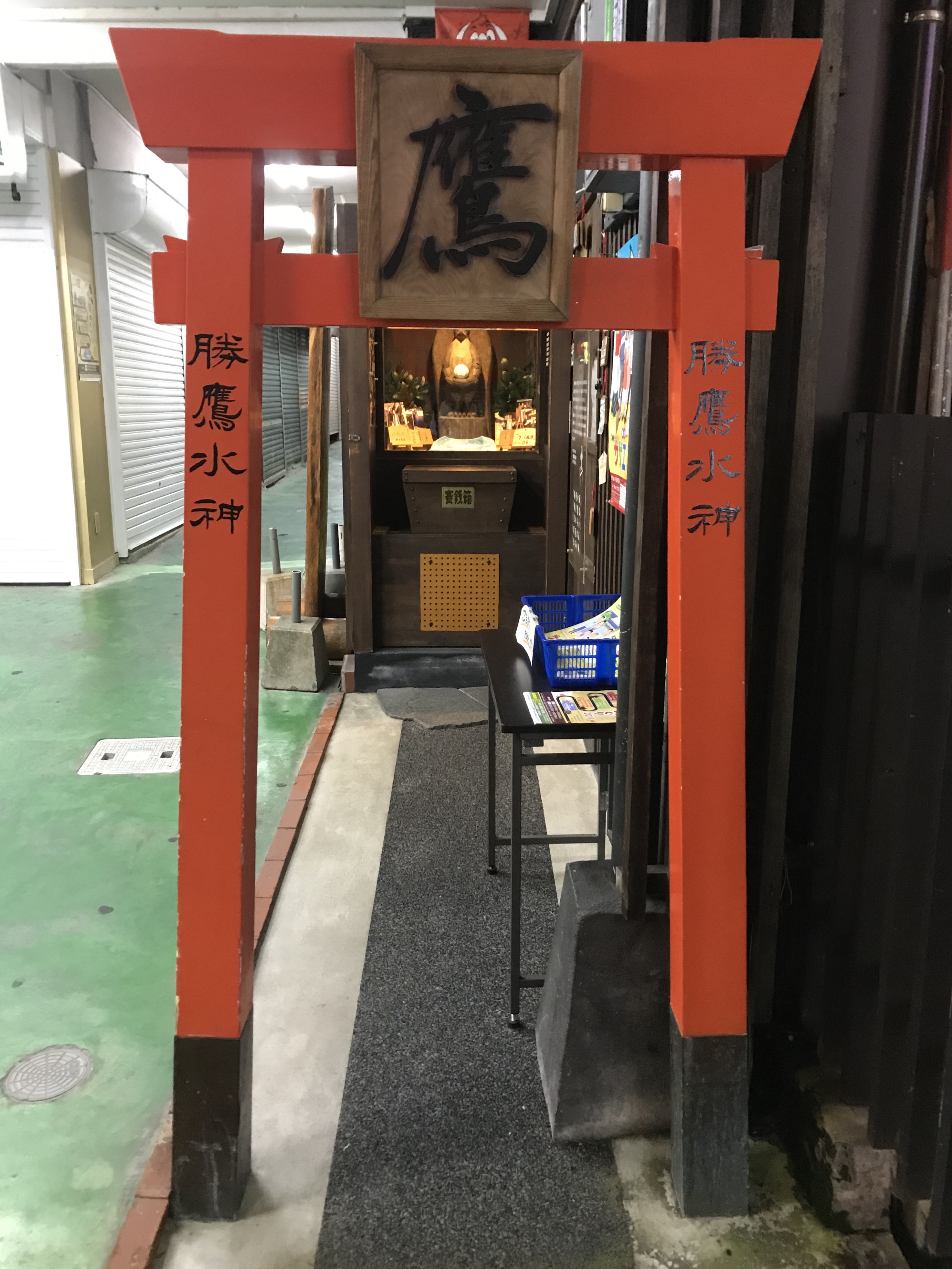 勝鷹水神社